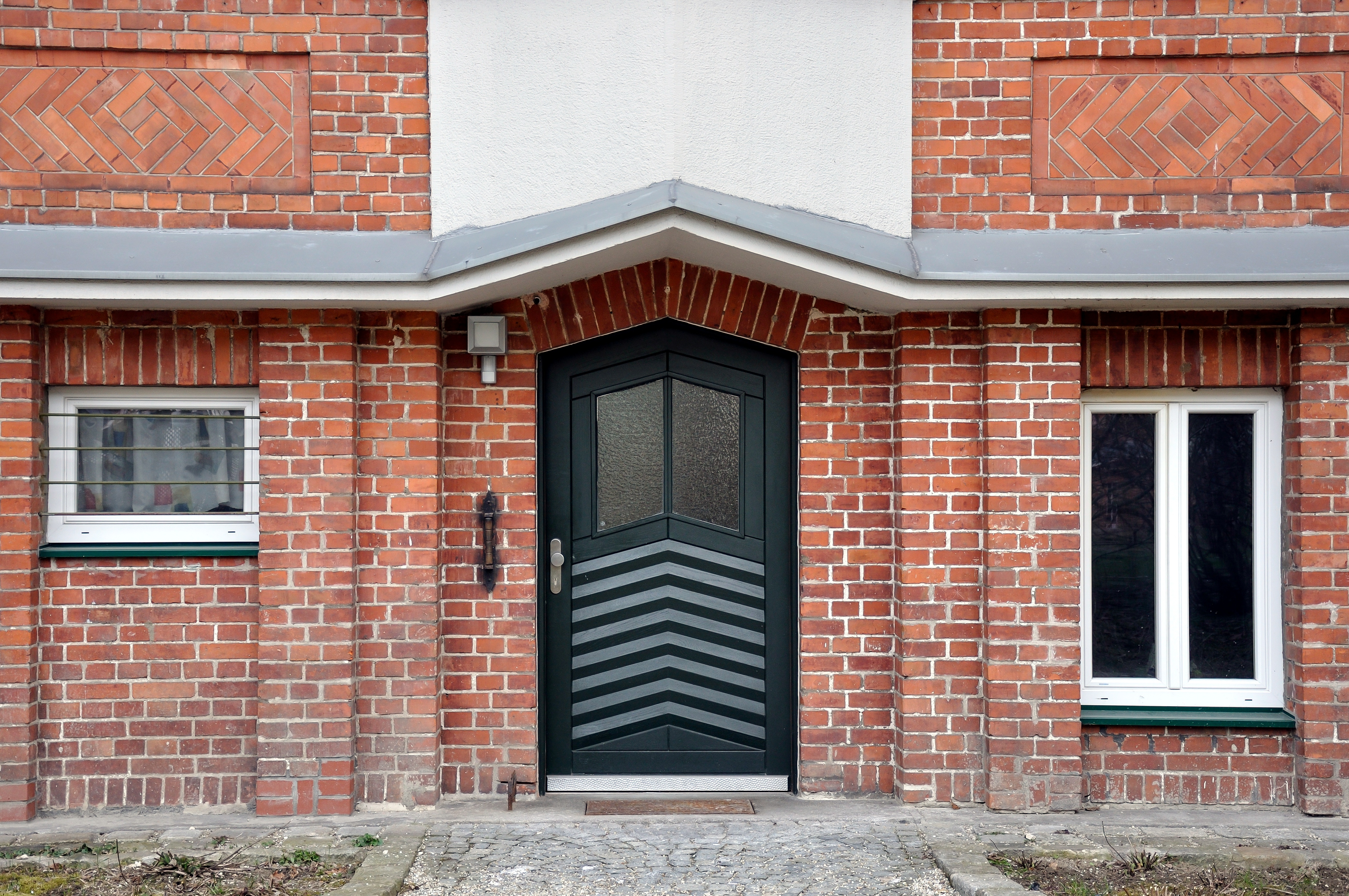 Dametzhof